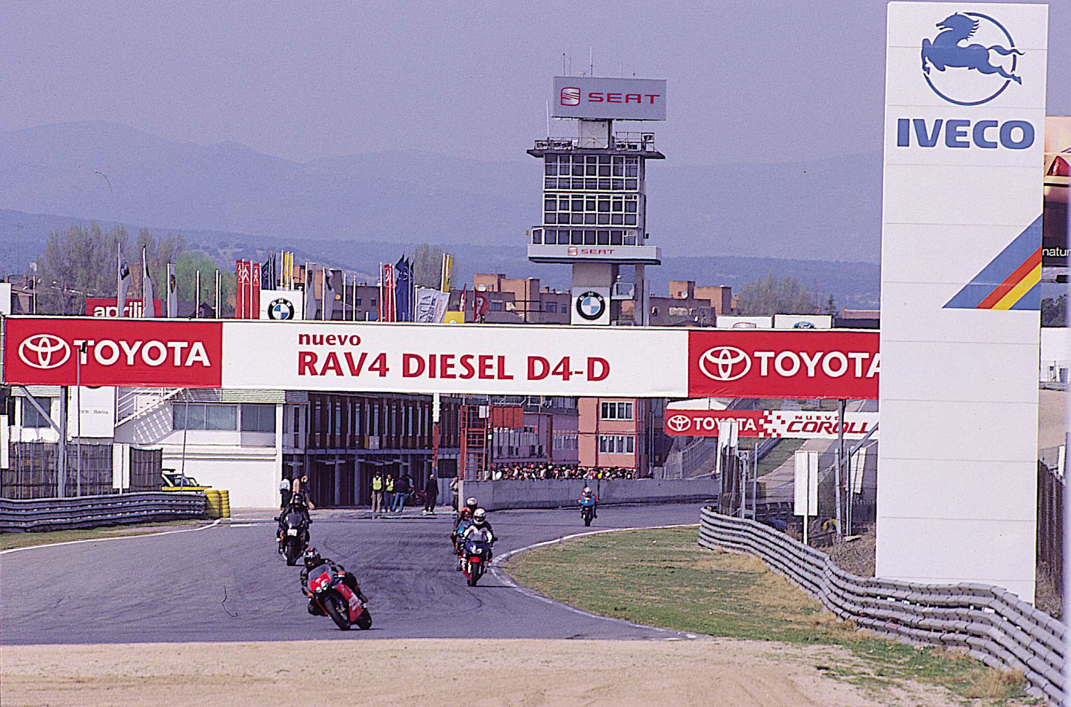 Circuito del Jarama en San Sebastián de los Reyes.